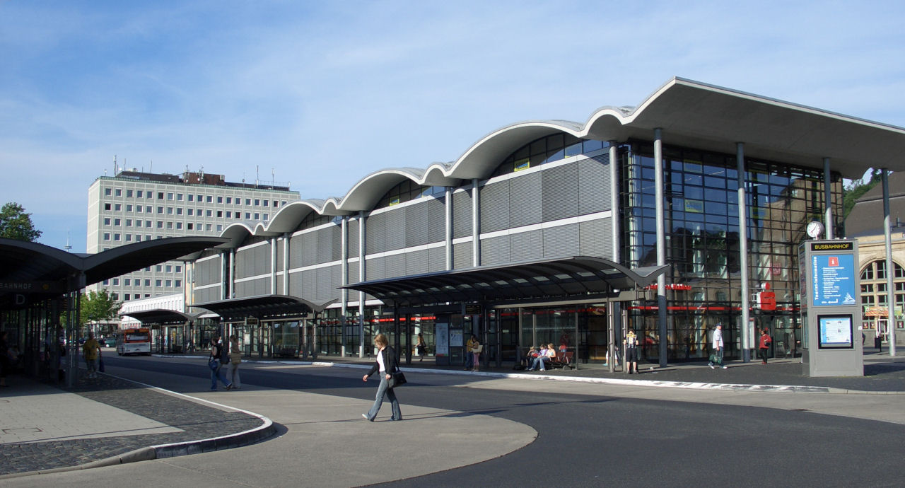 Bahnhofsvorplatz von Koblenz, Rheinland-Pfalz, Deutschland